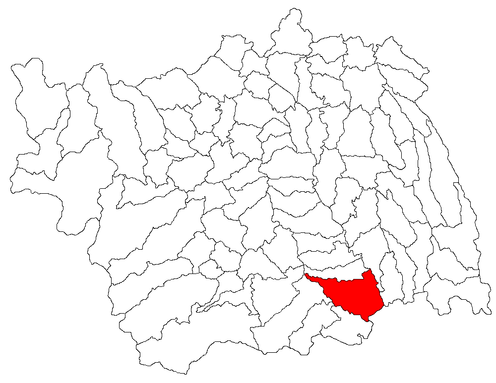 Categorie:Hărţi ale judeţului Bacău